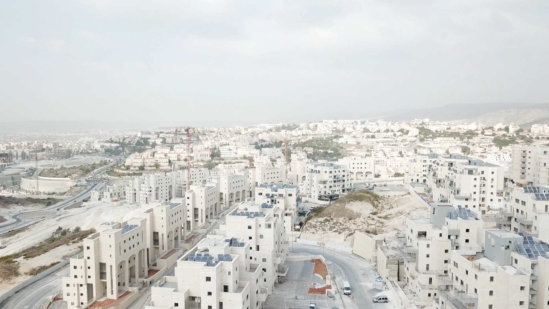 בית שמש משכונת רמה ג' וצפונה קרדיט צילום: "רווח הפקות" בית שמש